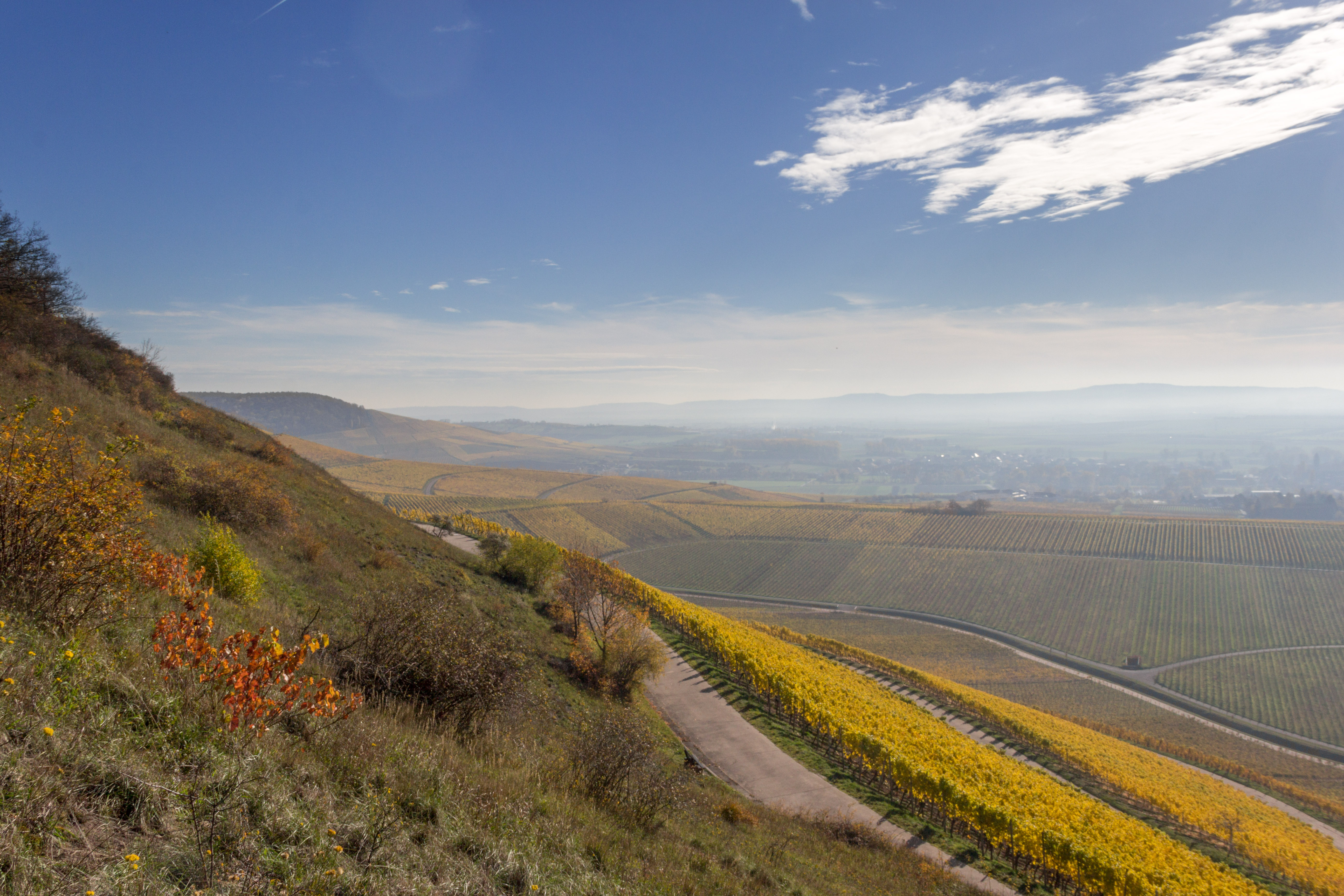 Schwanberg, Weinberg,Iphofen, Landschaftsschutzgebiet und Naturparks Steigerwald, Vogelschutzgebiet Südlicher Steigerwald, FFH-Gebiet Vorderer Steigerwald mit Schwanberg